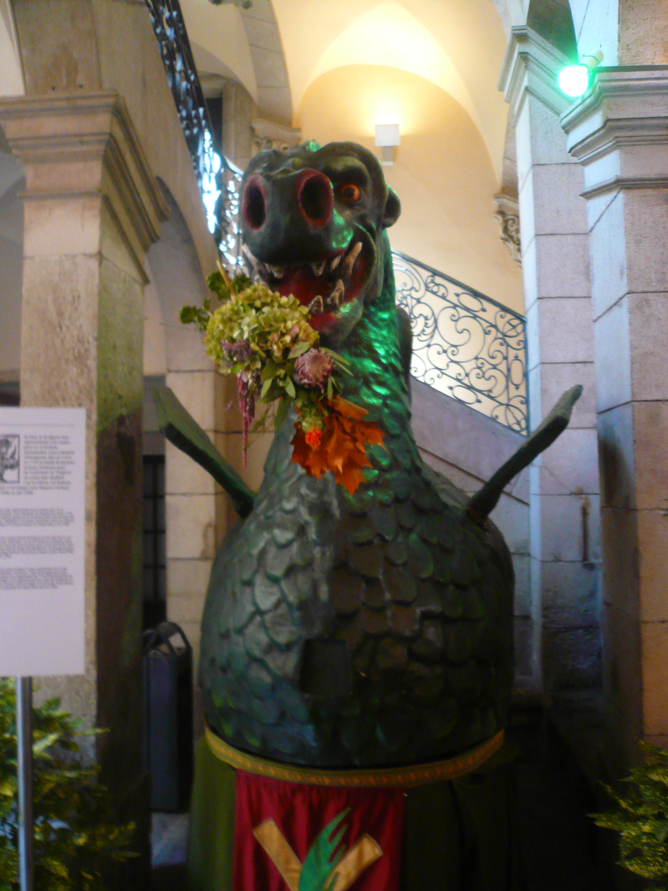 Palau de la Virreina (Barcelona) Object location41° 22′ 57″ N, 2° 10′ 18.01″ E